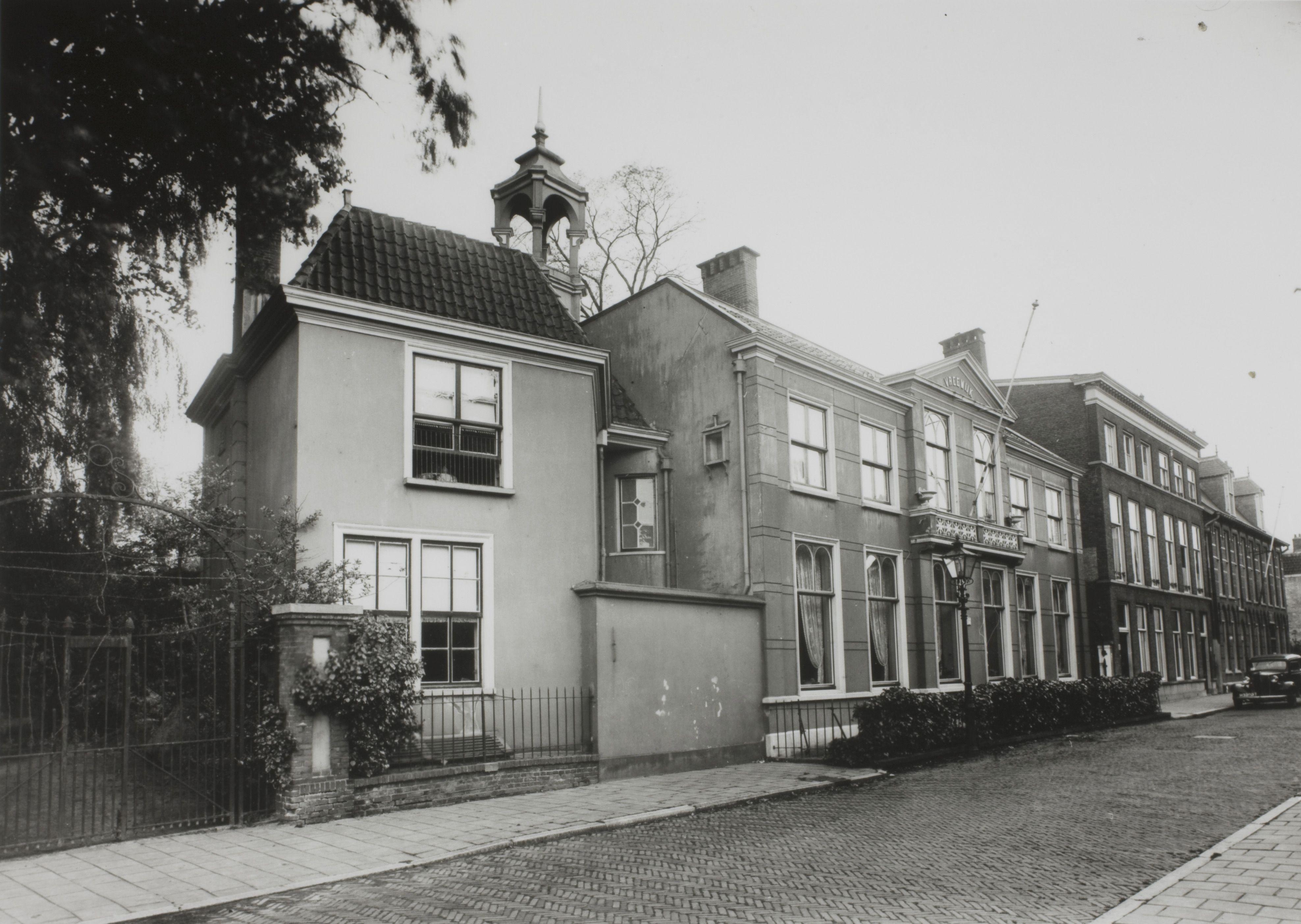 Vreewijkstraat 8, Huize 'Vreewijk'. Voorgevel vanuit de Vreewijkstraat naar het westen gezien. Foto 18 x 24 cm, 1935.